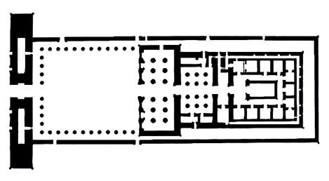 תוכנית מקדש מצרי טיפוסי